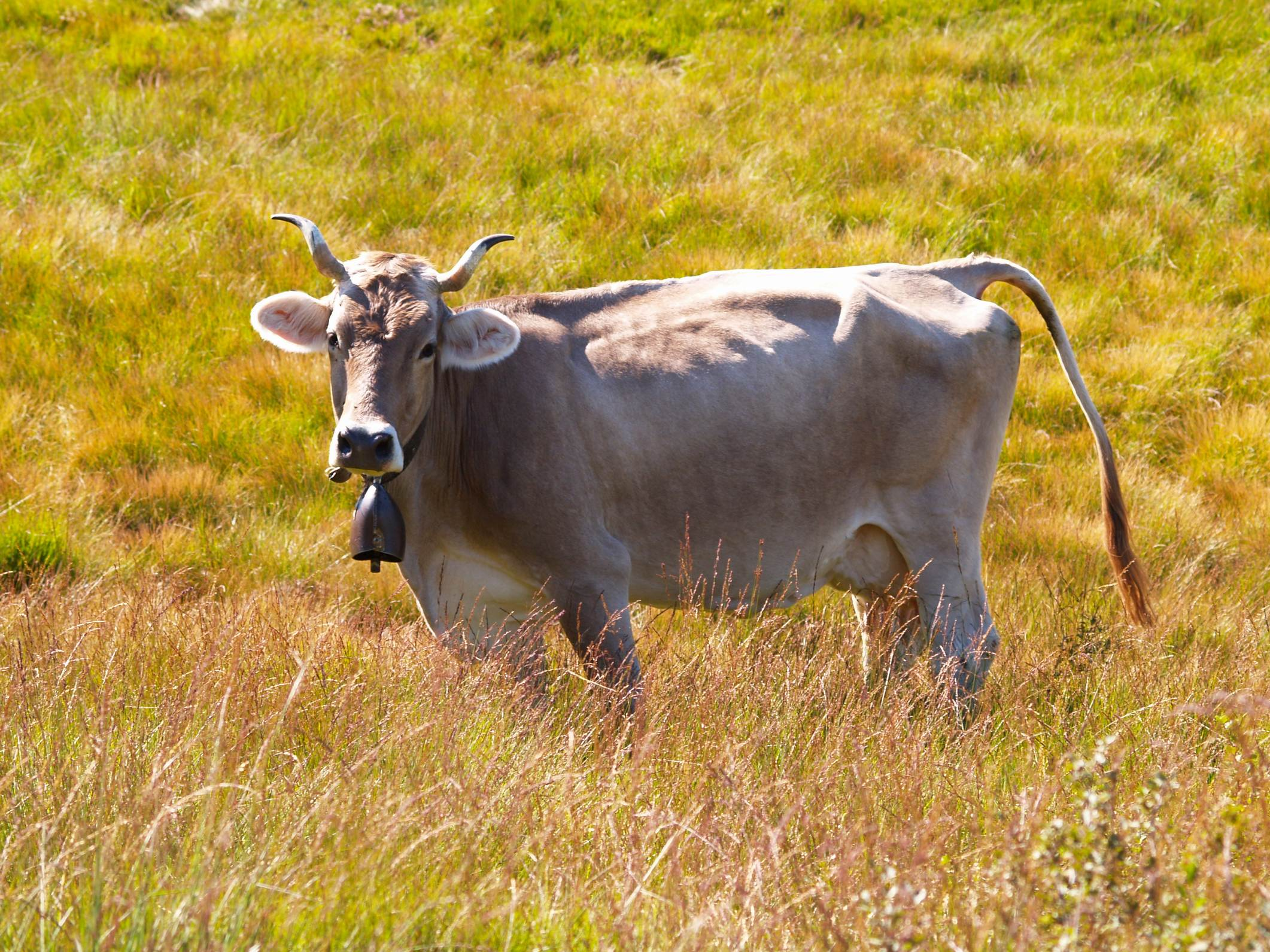 Vacca al pascolo ripresa nei pressi della Cima di Medeglia (Canton Ticino, Svizzera). Foto: Simone Müller